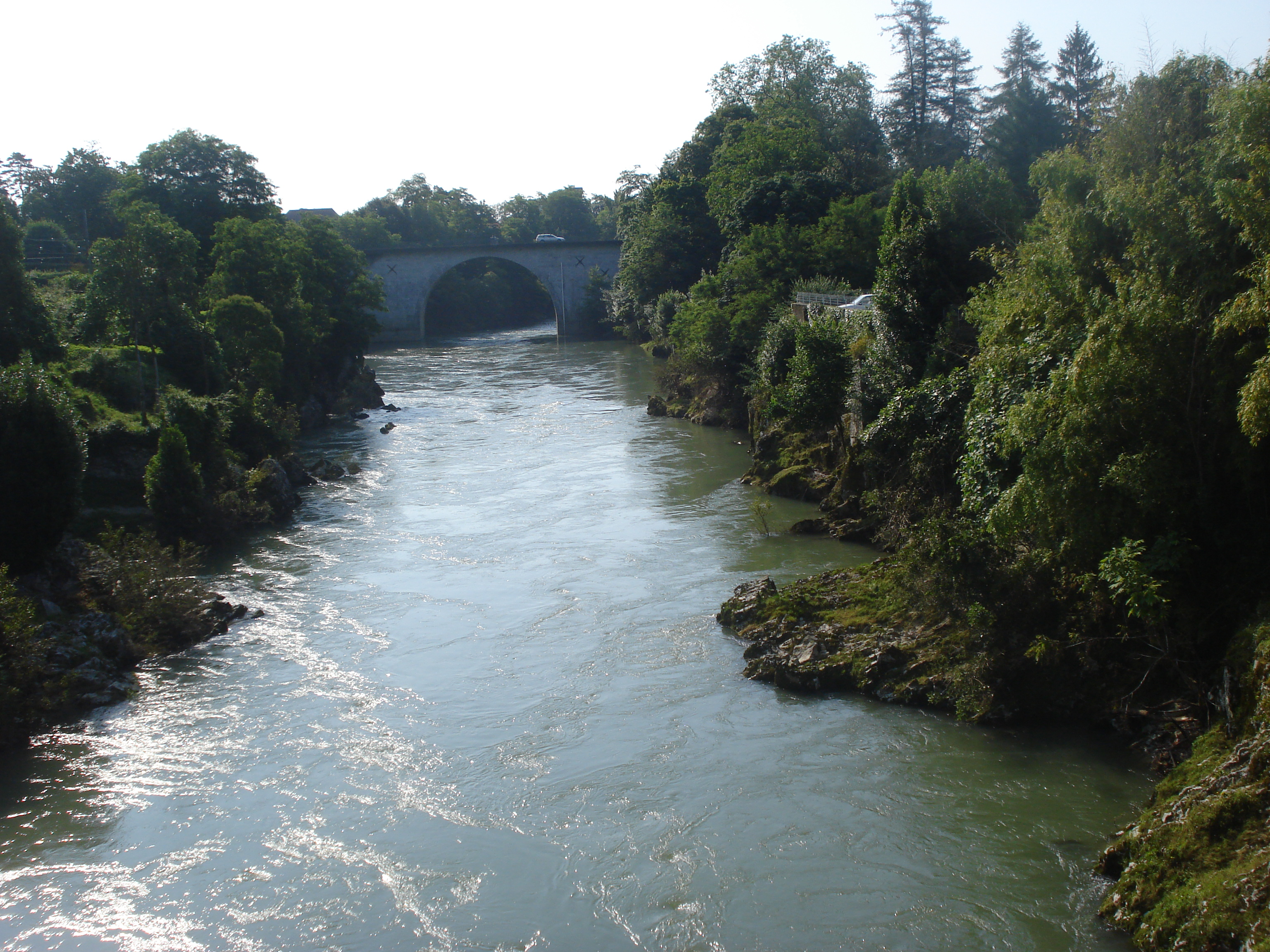 Gave de Pau vers l'aval, Orthez (Pyr-Atl, Fr).